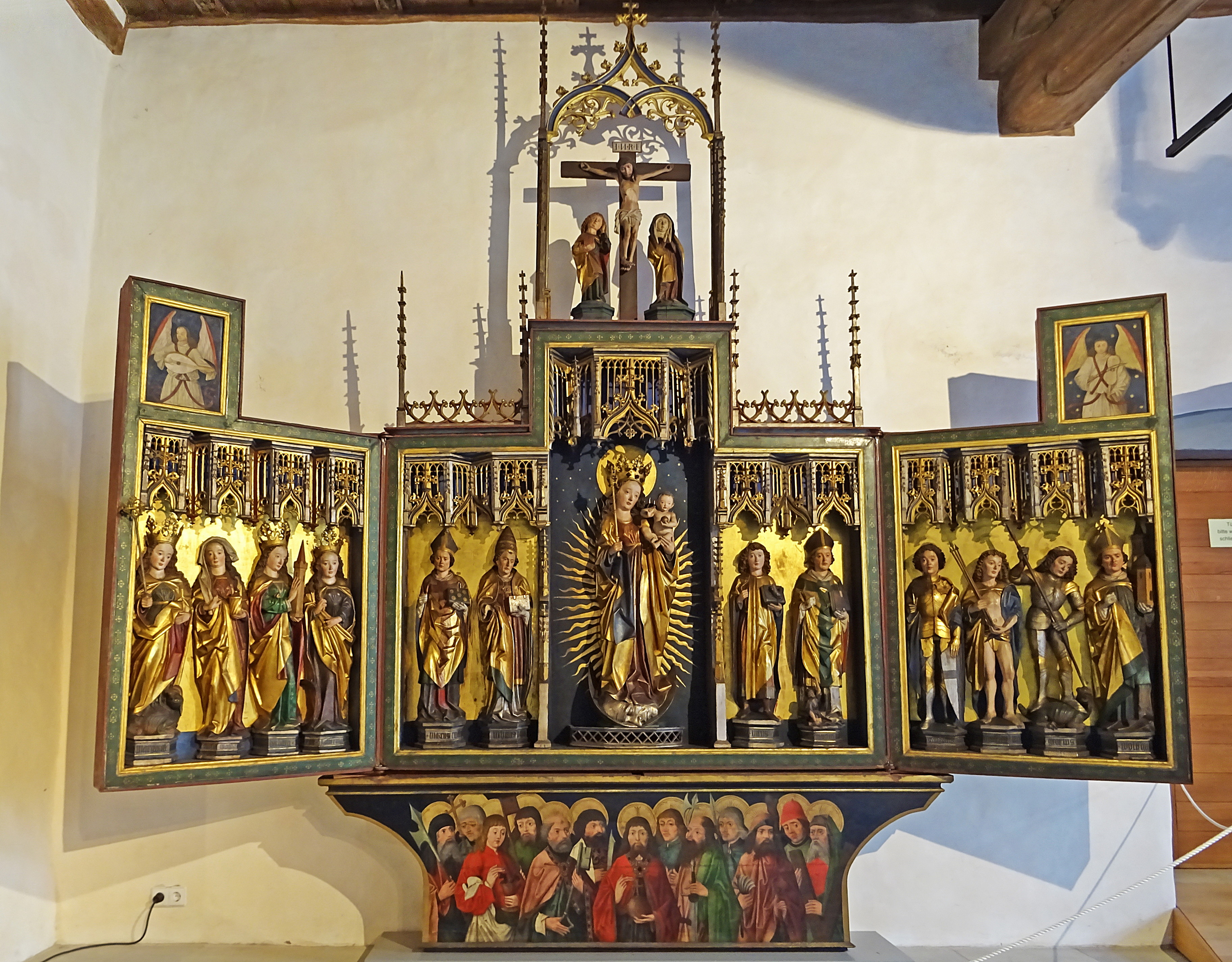 Großer Marienaltar vom Meister des Zeigerheimer Altars (1489). Ursprünglich aus der im 16. Jh. abgebrochenen Marienkapelle vor dem Benediktinerkloster Saalfeld gelangte er nach der Reformation in die Dorfkirche Oberpreilipp (Rudolstadt). Links: Margaretha, Maria Magdalena, Barbara. Mitte: Markus, Urban, Maria als Himmelskönigen mit Jesuskind im Strahlenkranz auf einer Mondsichel, Veit, Martin. Rechts: Gangolf, Sebastian, Georg, Wolfgang. Das Original befindet sich im Klostermuseum (Saalfeld).